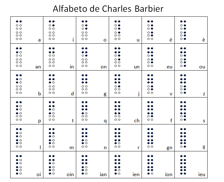 Tabla de códigos del alfabeto creado por Charles Barbier precursor del sistema Braille.